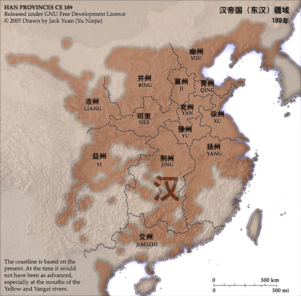 公元189年时的东汉疆域。